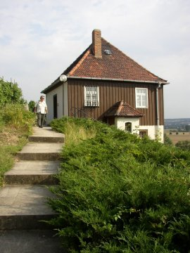 Das so genannte Radierhäuschen von Max Klinger in Großjena, aufgenommen von Udo Fischer am 01.08.2004